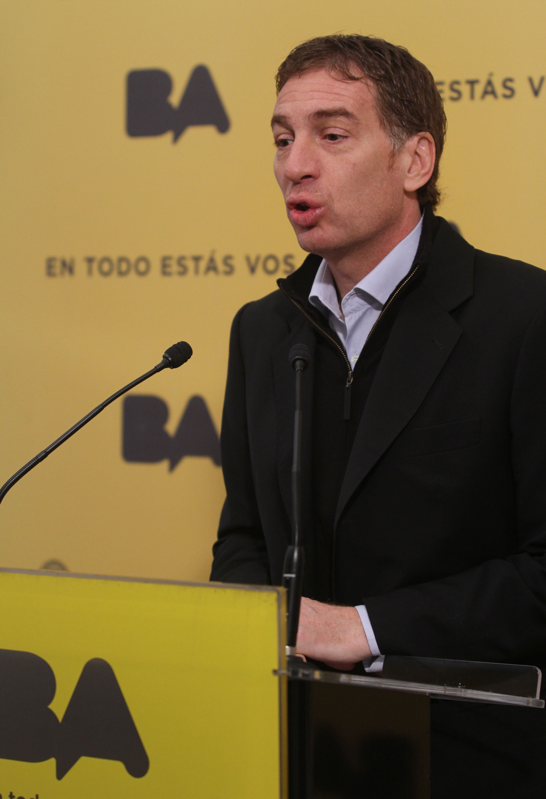 Buenos Aires. Junio 27 de 2012. El Ministro de Medio Ambiente del gobierno porteño, Diego Santilli, habla con la prensa luego de la reunión de gabinete que se realizó en el Jardín Botánico. Foto María Inés Ghiglione-gv/GCBA.